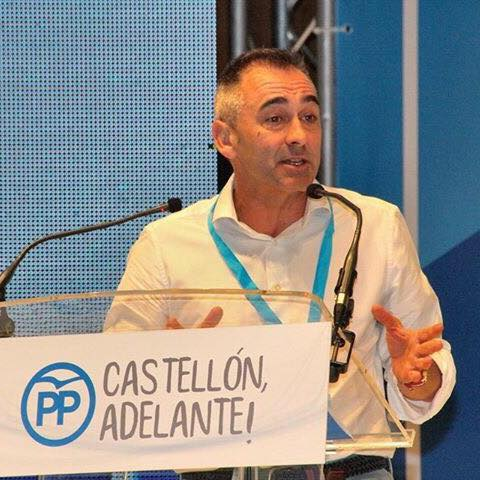 Miguel Barrachina en el XIV Congreso del PP de Castellón